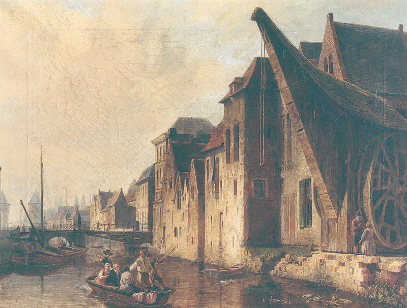 De hijskraan aan de Leie in Kortrijk, met links de Broeltorens. Schilderij uit 1815 van Henri De Pratere. Stedelijke musea Kortrijk (Groeningeabdij)